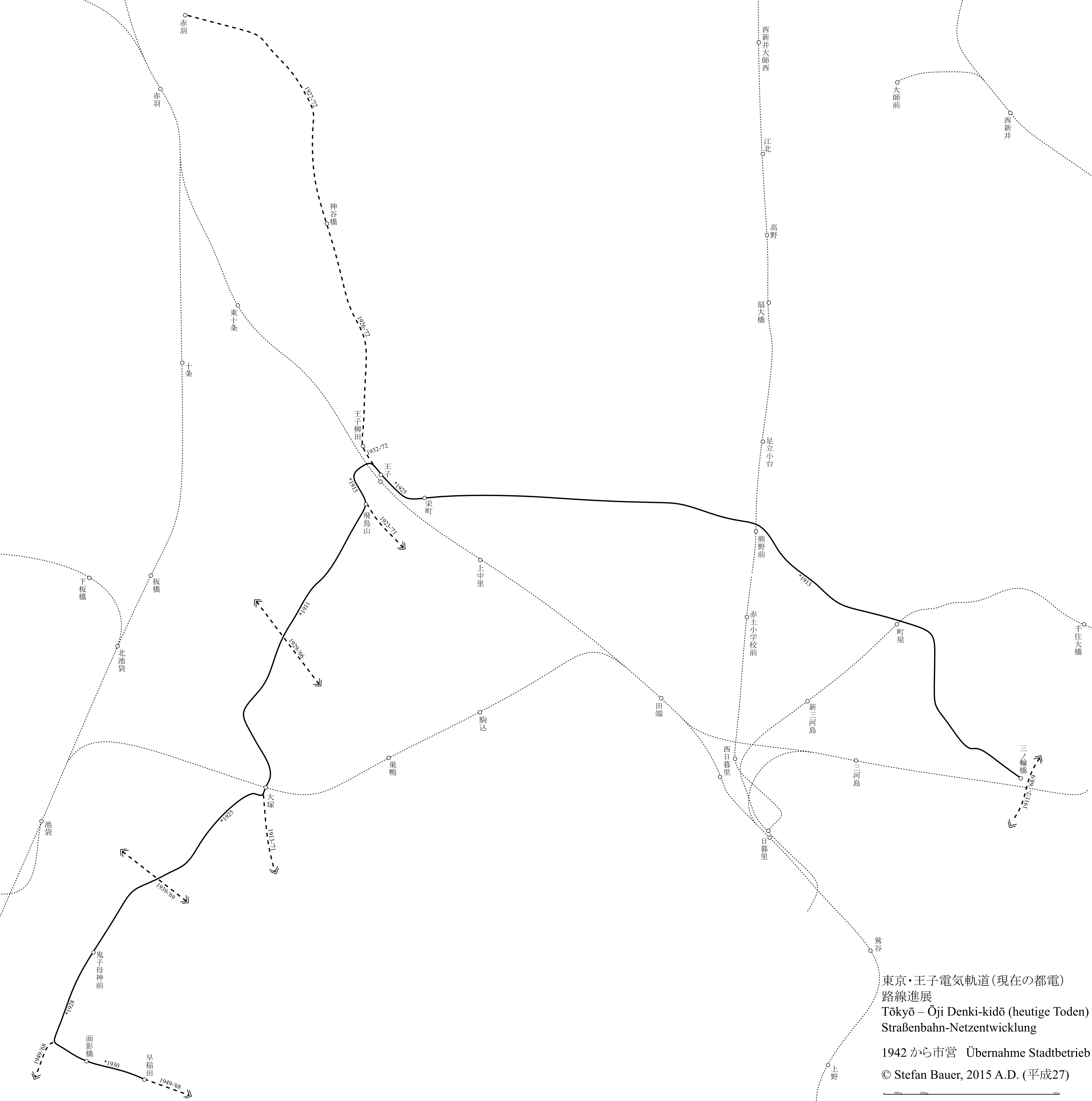 東京・王子電気軌道の路線進展図